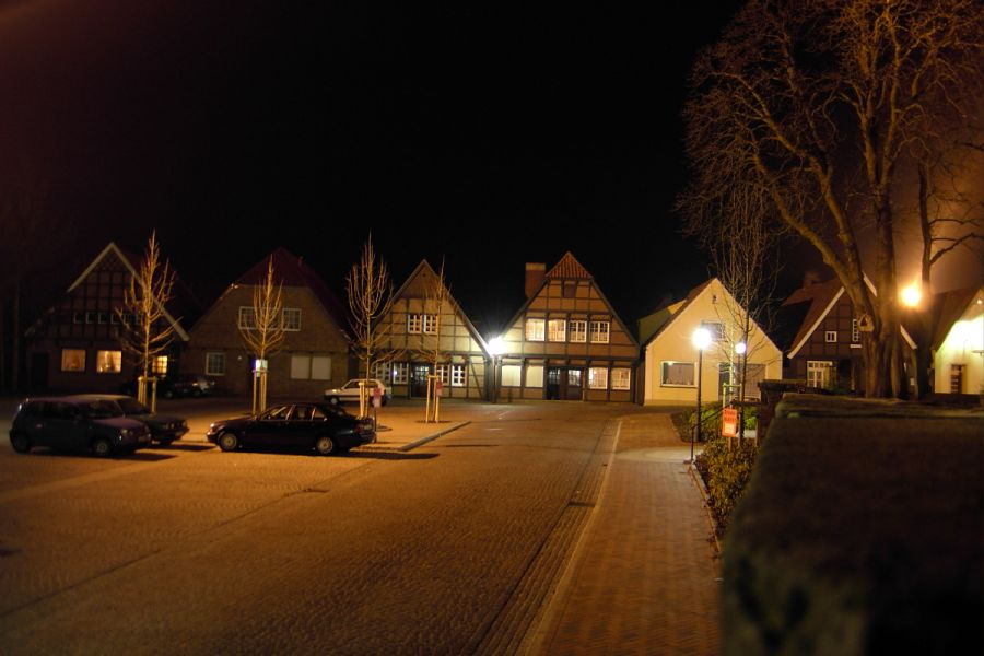 Hofstätt in Haselünne